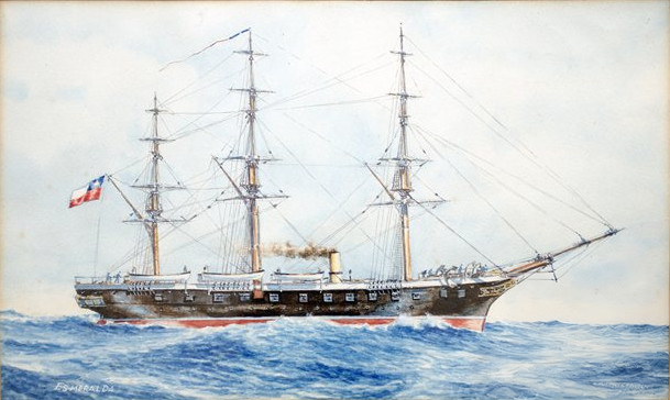 La Esmeralda (1932; 24x31 cm.) por Carlos A. Finsterbusch, autor de la maqueta más antigua de la corbeta y quien que conoció a los últimos sobrevivientes de la Guerra.